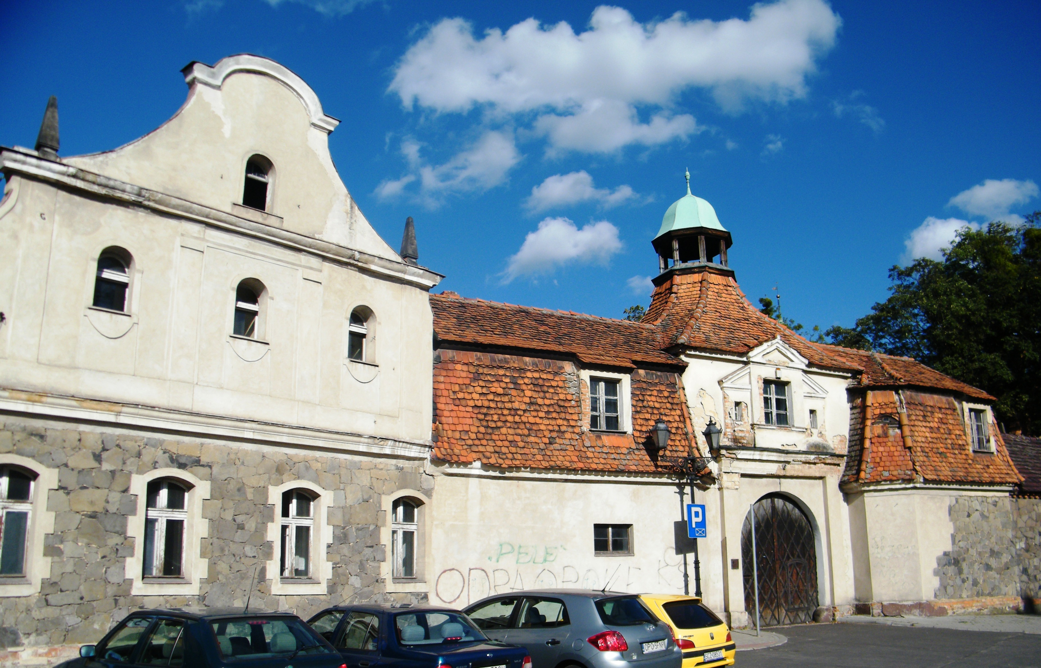 Niemodlin - budynek bramy w zespole zamkowym, brama (zabytek nr 849/64 z 08.05.1964)